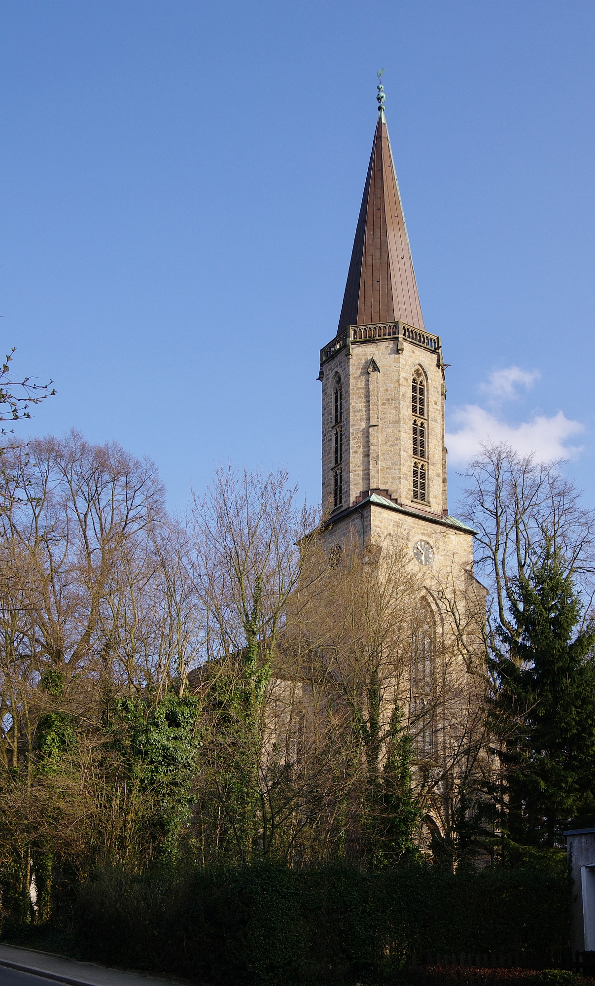 Die "Große Kirche" in Dortmund-Aplerbeck